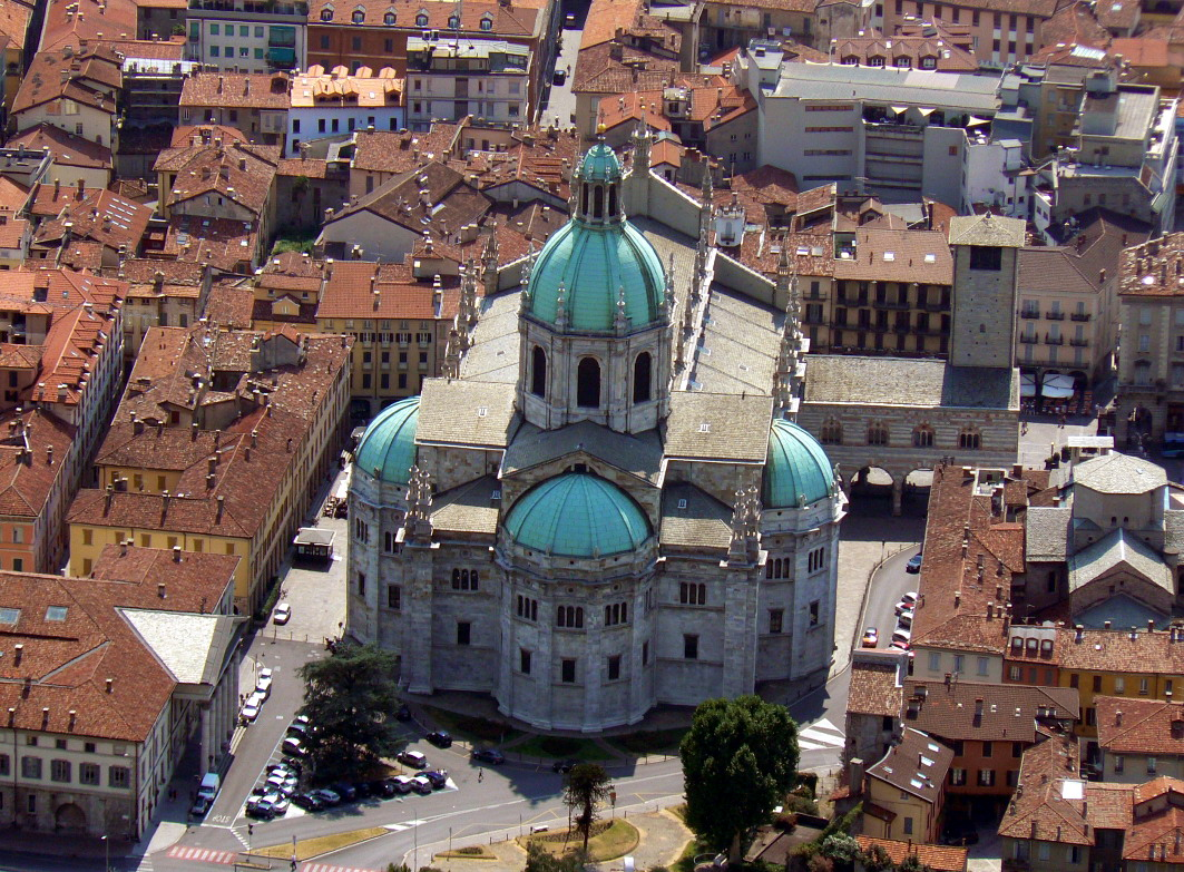 Katedra w Como. Autor zdjęcia: Robertmilan